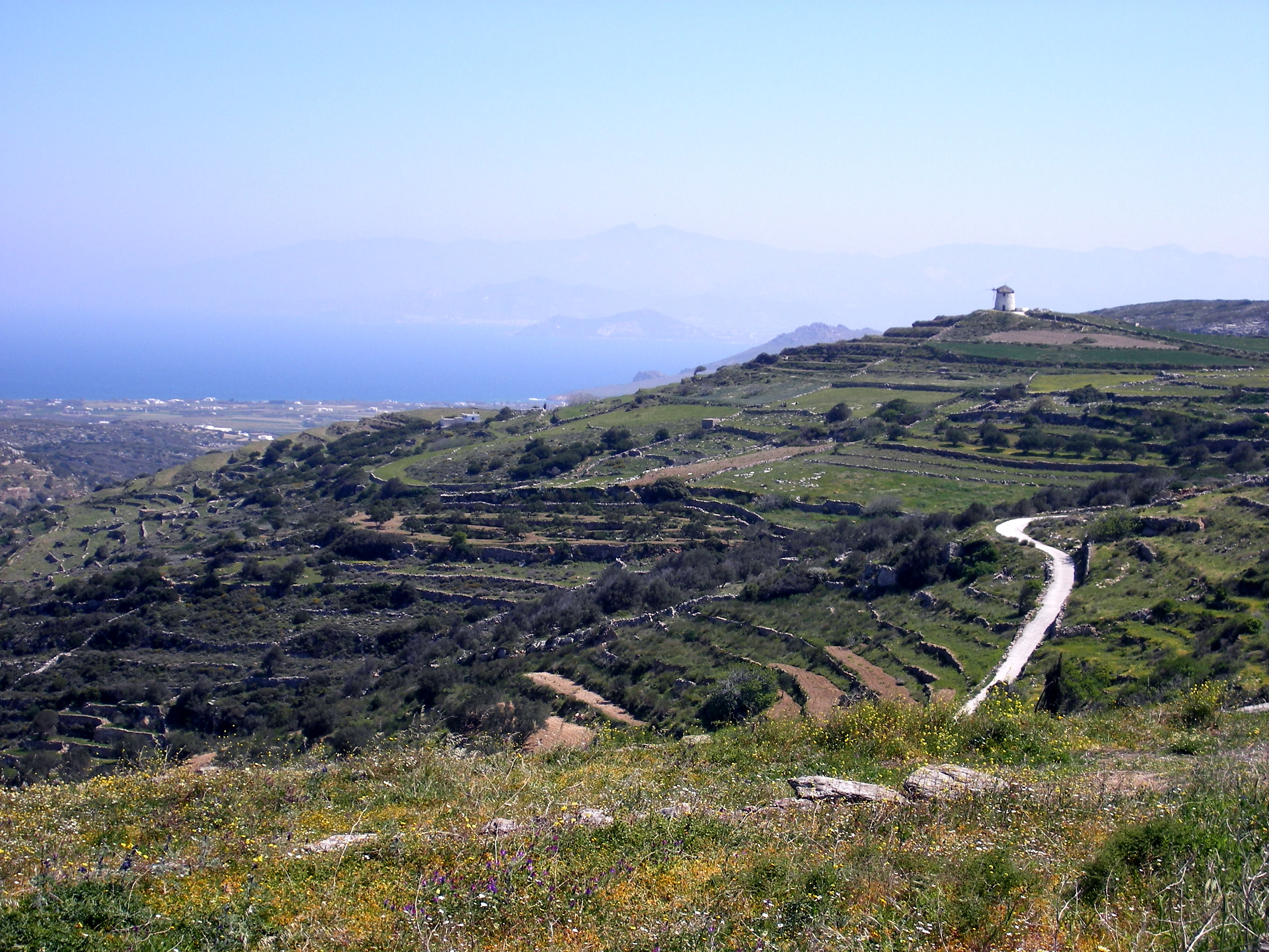 Paros Island, near Lefkes. Ile de Paros, paysage autour de Lefkes